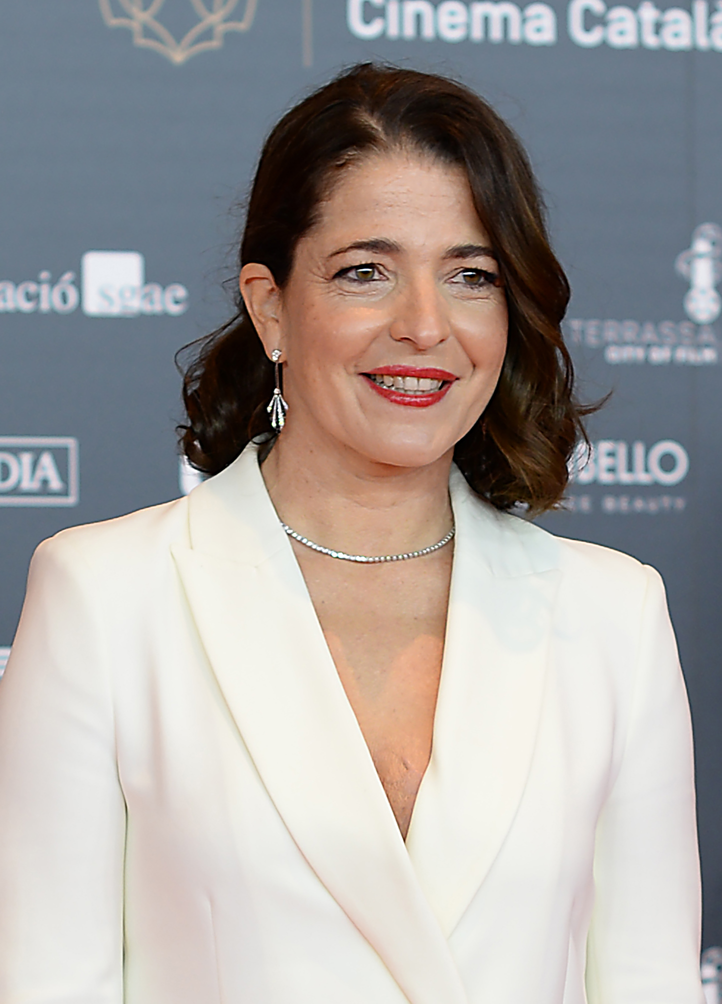 Nora Navas, actriu, XII Premis Gaudí (2020)